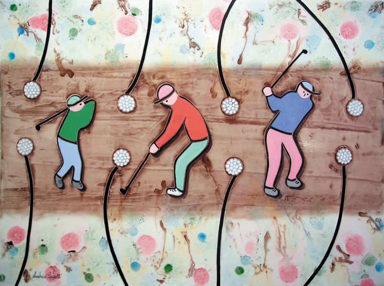 Golf (scena-IV) – Olio e pigmenti su tela, cm 60 x 80, (2010)